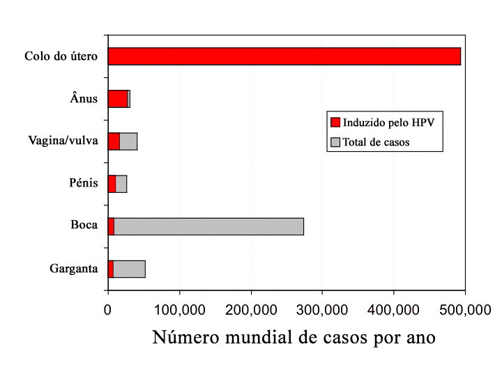 Incidência mundial de diversos tipos de cancro e relação com o HPV